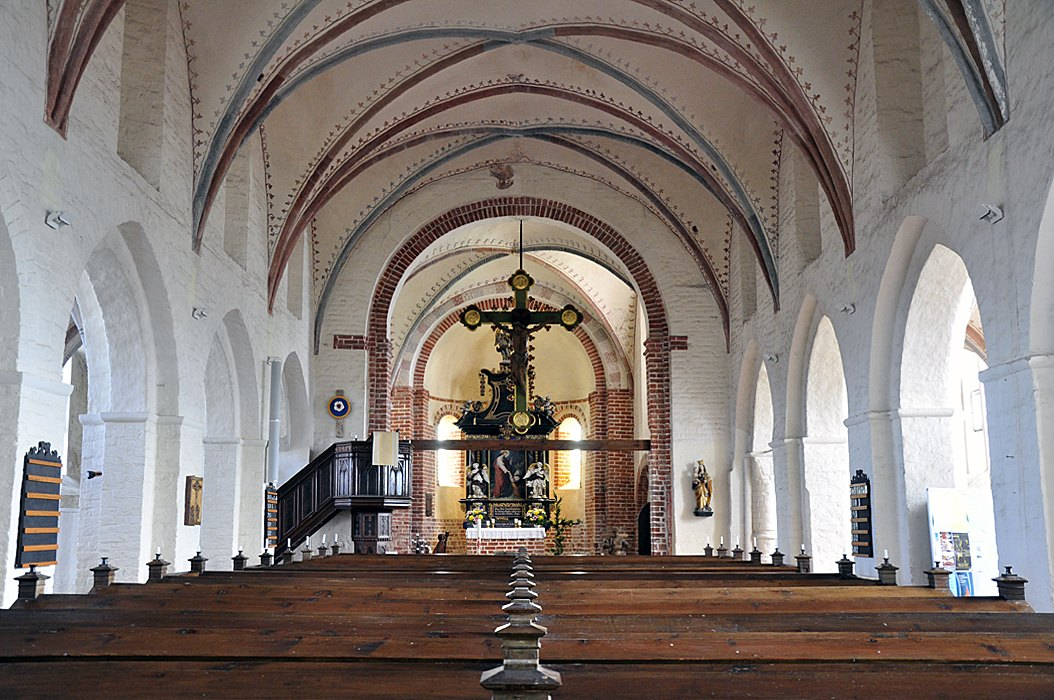 Pfarrkirche Altenkirchen, Rügen